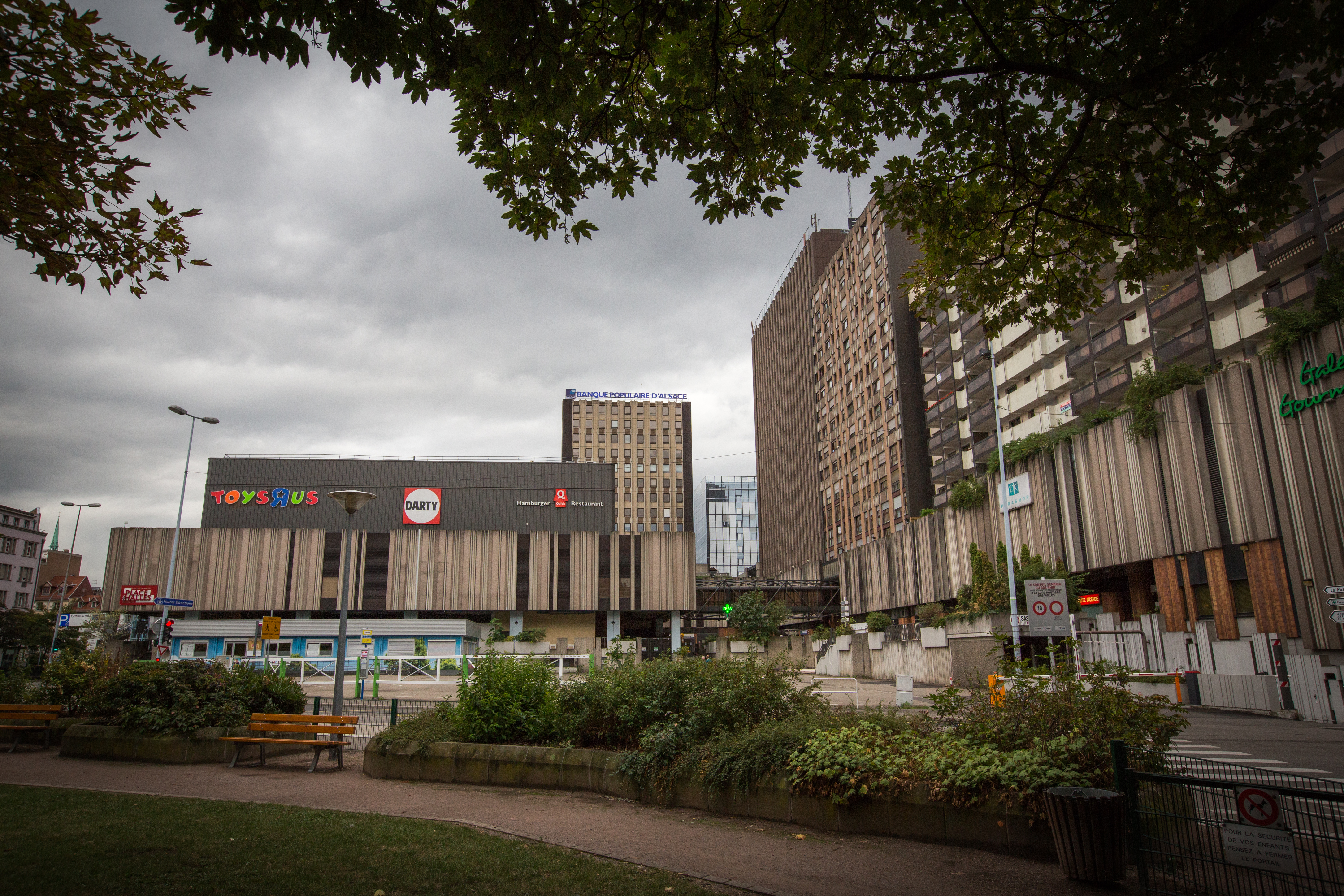 Strasbourg quartier des Halles